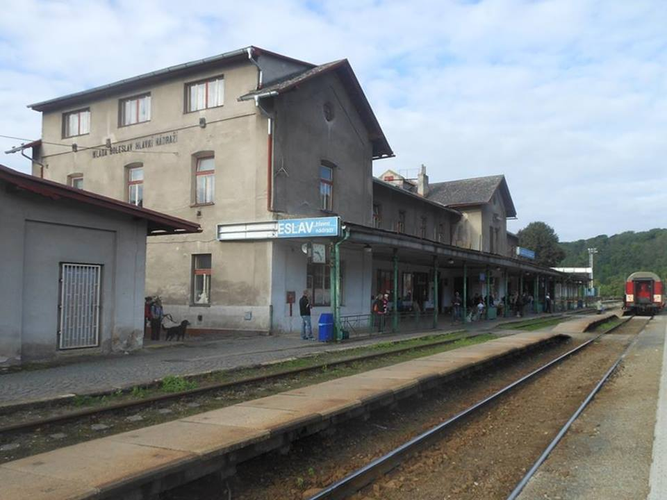 Staniční Budova